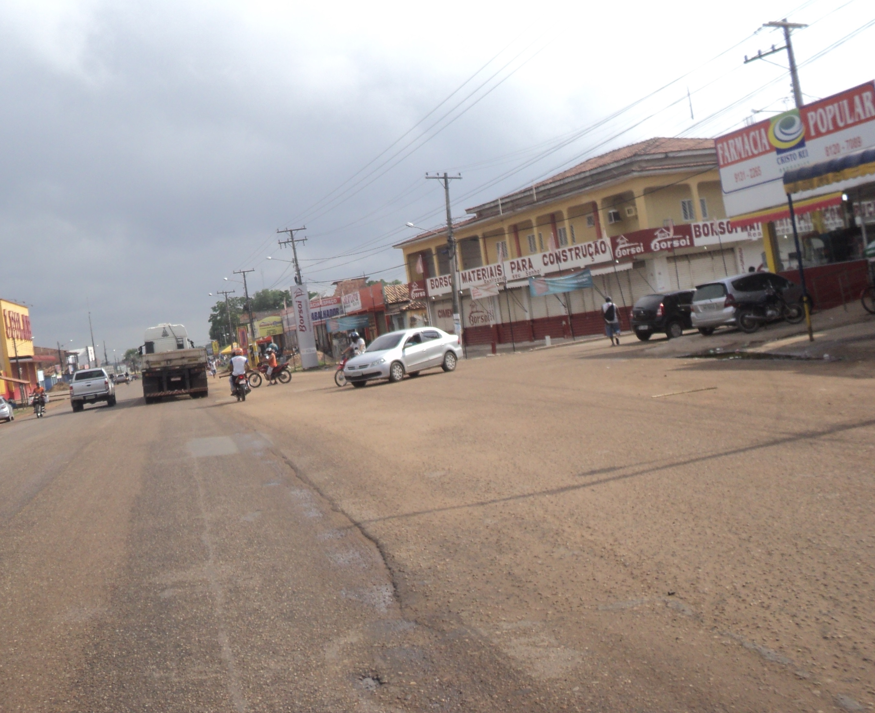 Rodovia BR-155 em Marabá, atravessando o distrito urbano de São Félix.